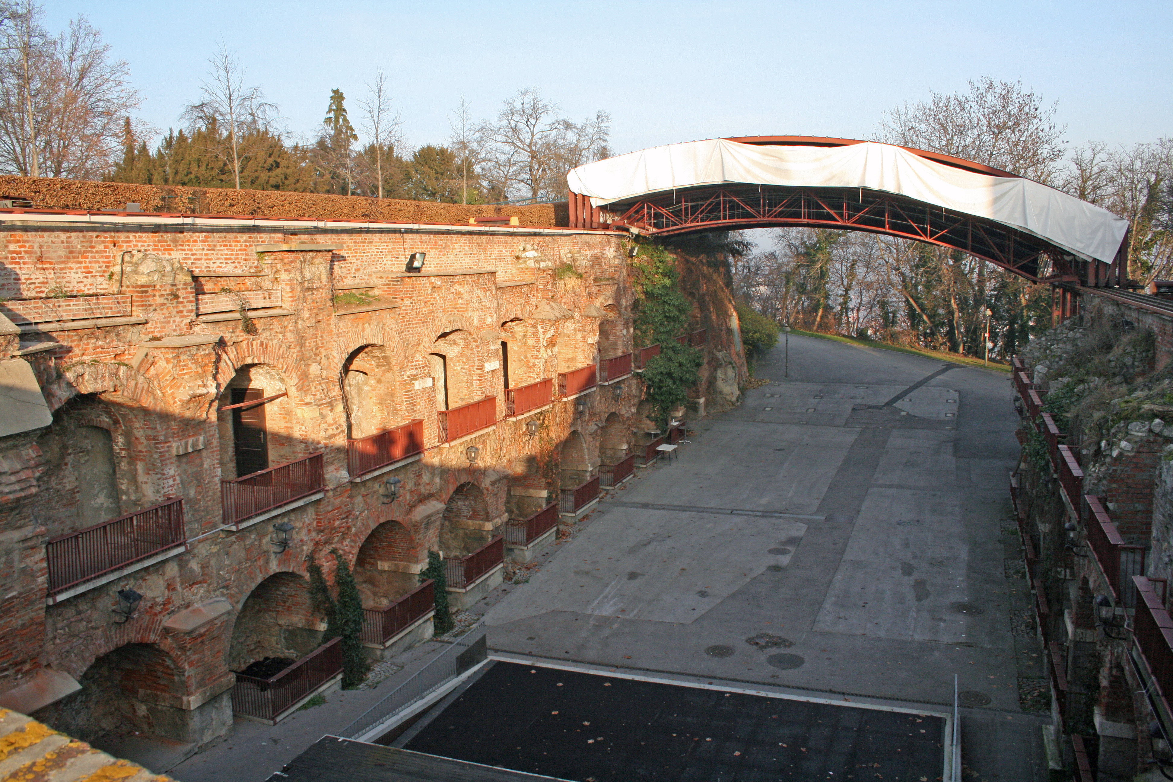 Graz, Austria: Schlossbergbühne Kasematten